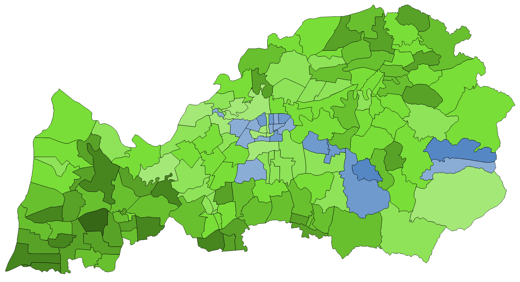 顏色對照表